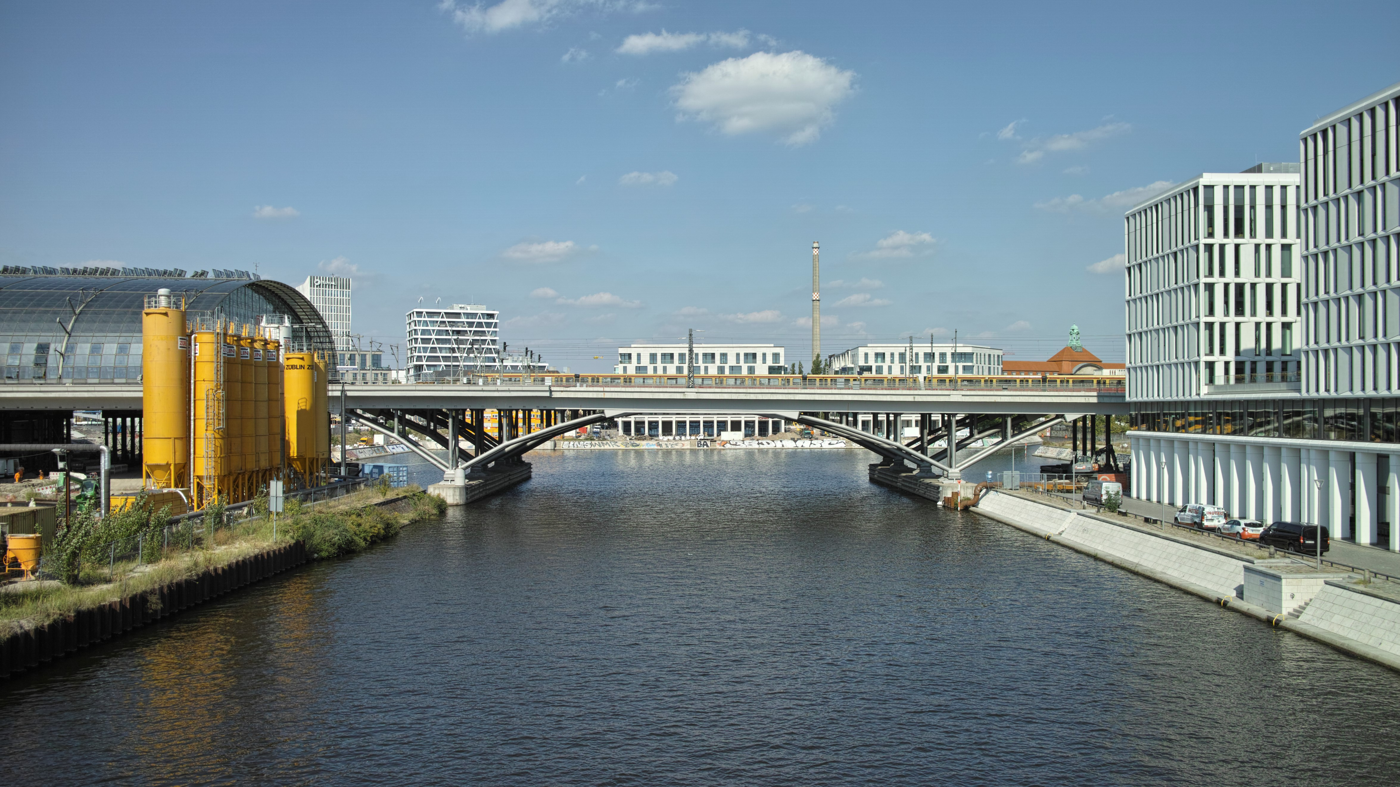 Humboldthafen Berlin von der Hugo-Preuß-Brücke (südliche Abgrenzung des Hafens) aus fotografiert. In der Mitte die Humboldthafenbrücke 11.09.2019This is a photograph of an architectural monument.